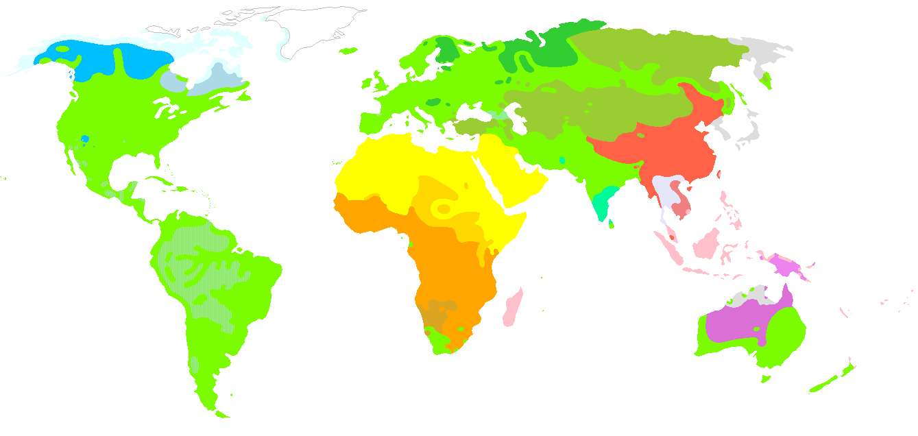 Les familles de langues sans légende Afro-asiatiques Nigéro-congolaises Nilo-sahariennes Khoïsan Indo-européennes Caucasiennes Altaïques Ouraliennes Dravidiennes Sino-tibétaines Austroasiatiques Austronésiennes Pama-nyungan Papoues Tai-Kadai Amérindiennes Na-dené Eskimo-aléoutes Isolat